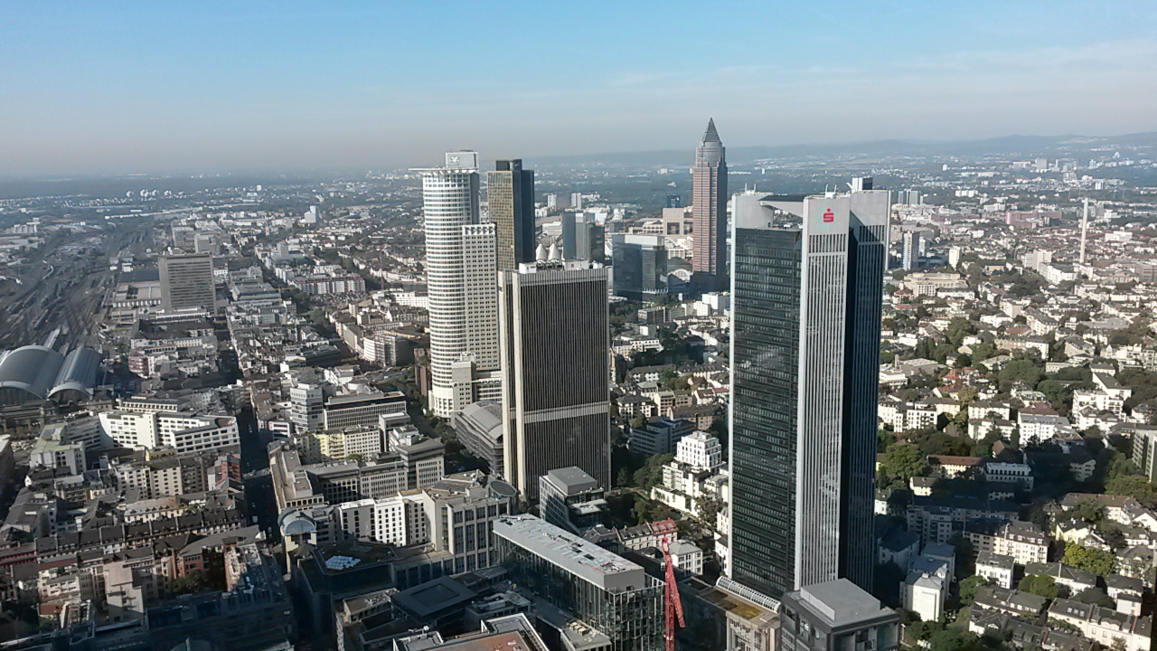 Blick von Aussichtsplattform richtung Westen